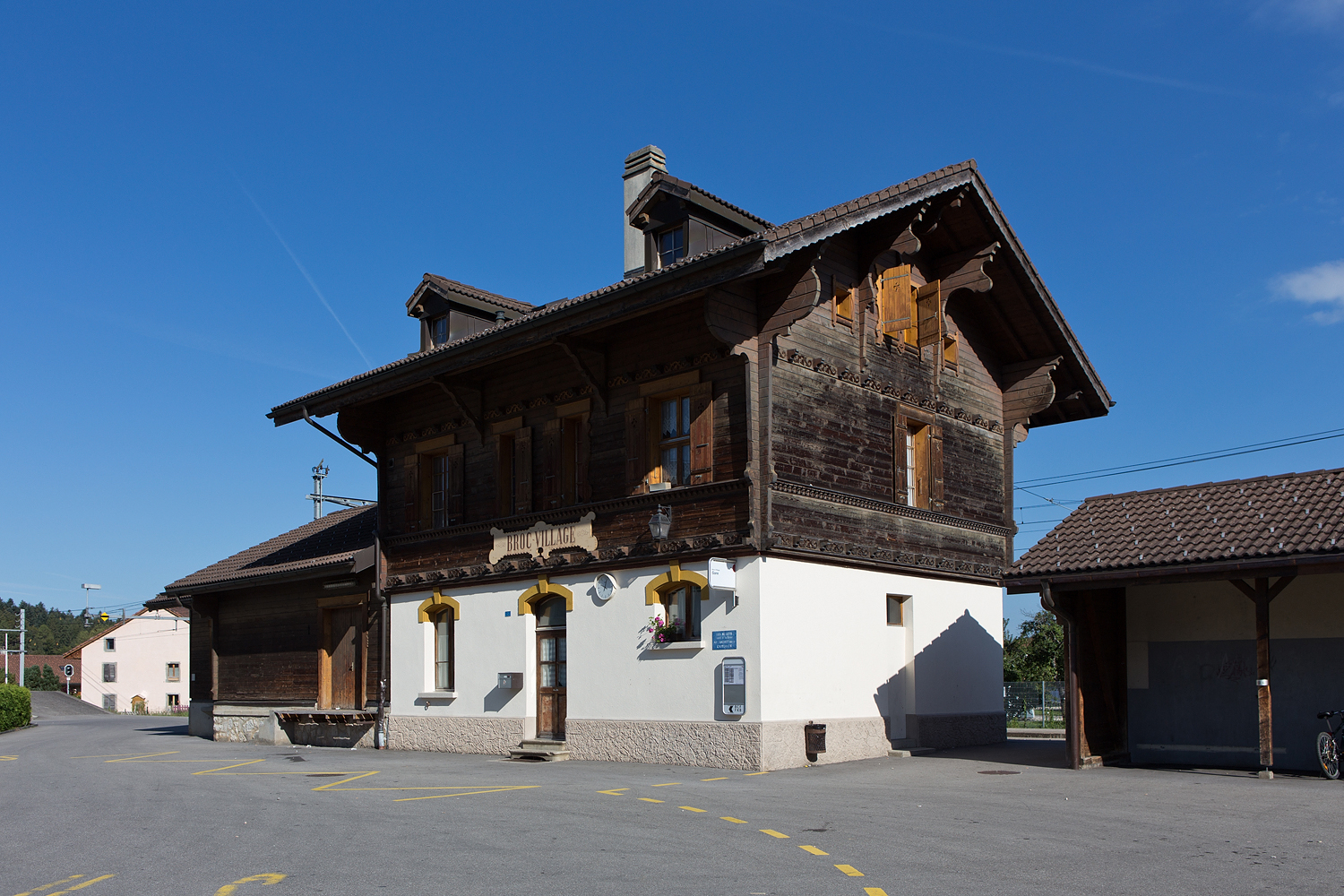 La gare de Broc